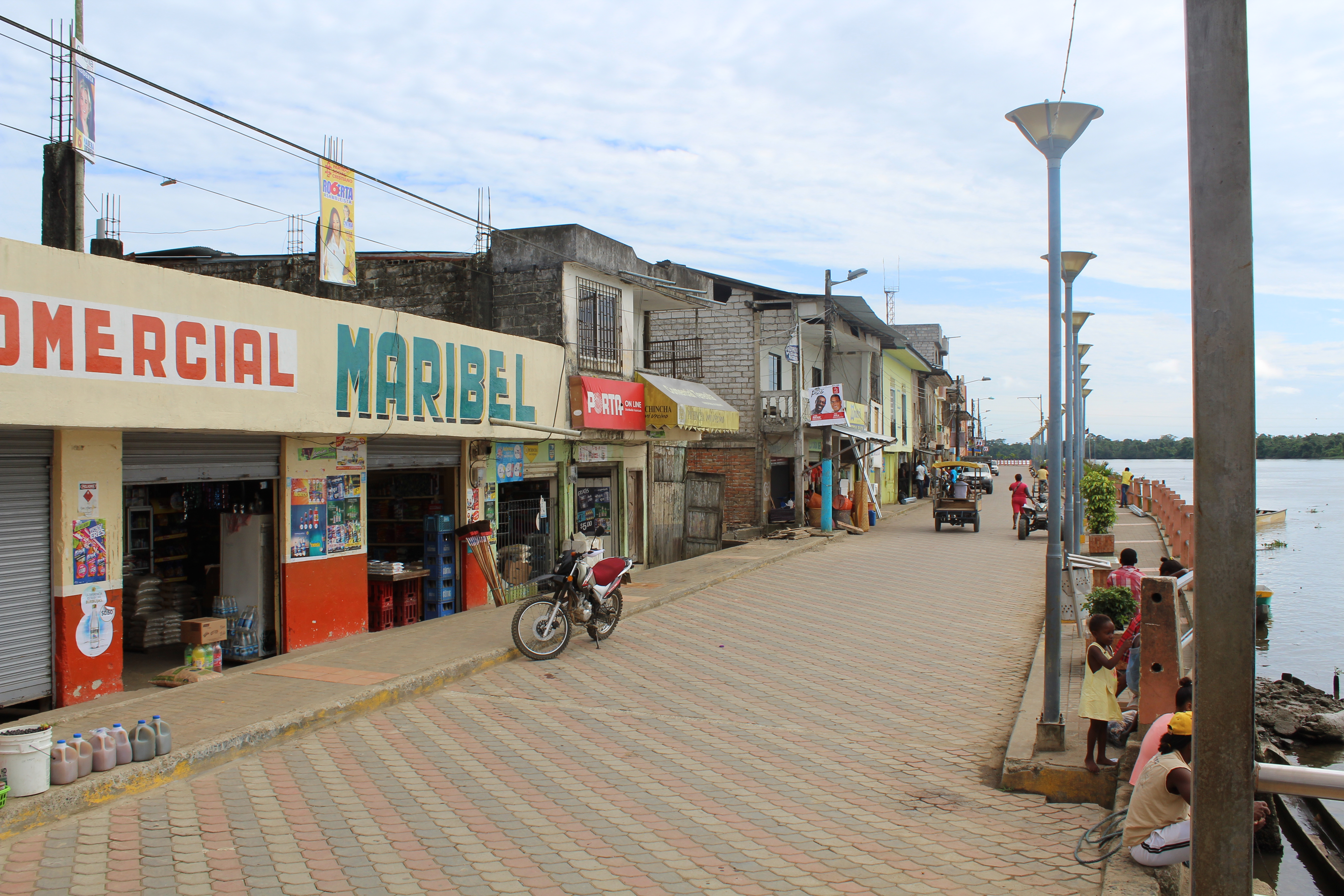 Malecón de Borbón, Cantón Eloy Alfaro, Esmeraldas Ecuador Rio Cayapas